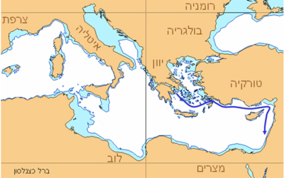 אוניית המעפילים ברל כצנלסון - מסלול